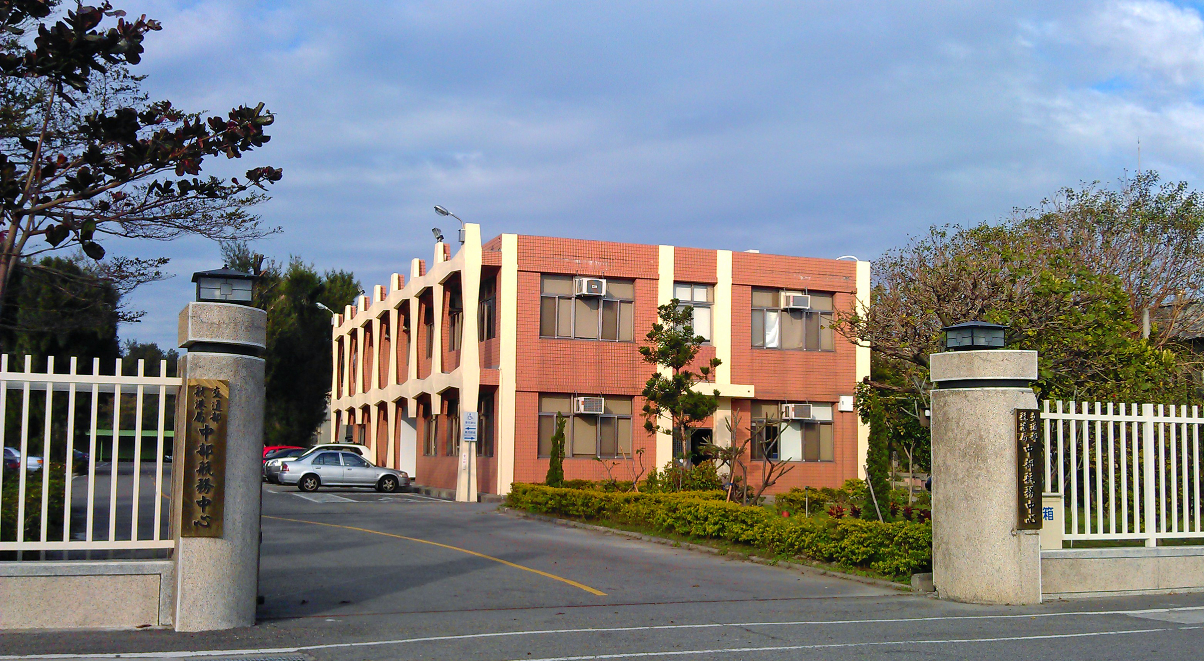 交通部航港局中部航務中心，位於臺灣臺中市梧棲區臨海路83之3號。